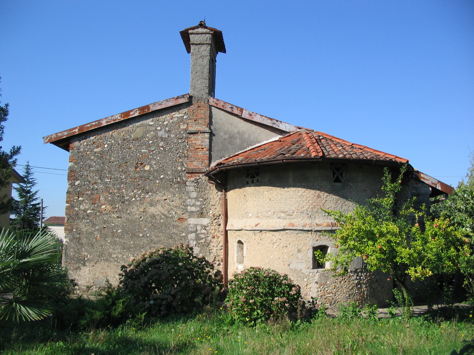 Chiesa dei Santi Siro e Sinigoldo, chiesa romanica in Capriate San Gervasio